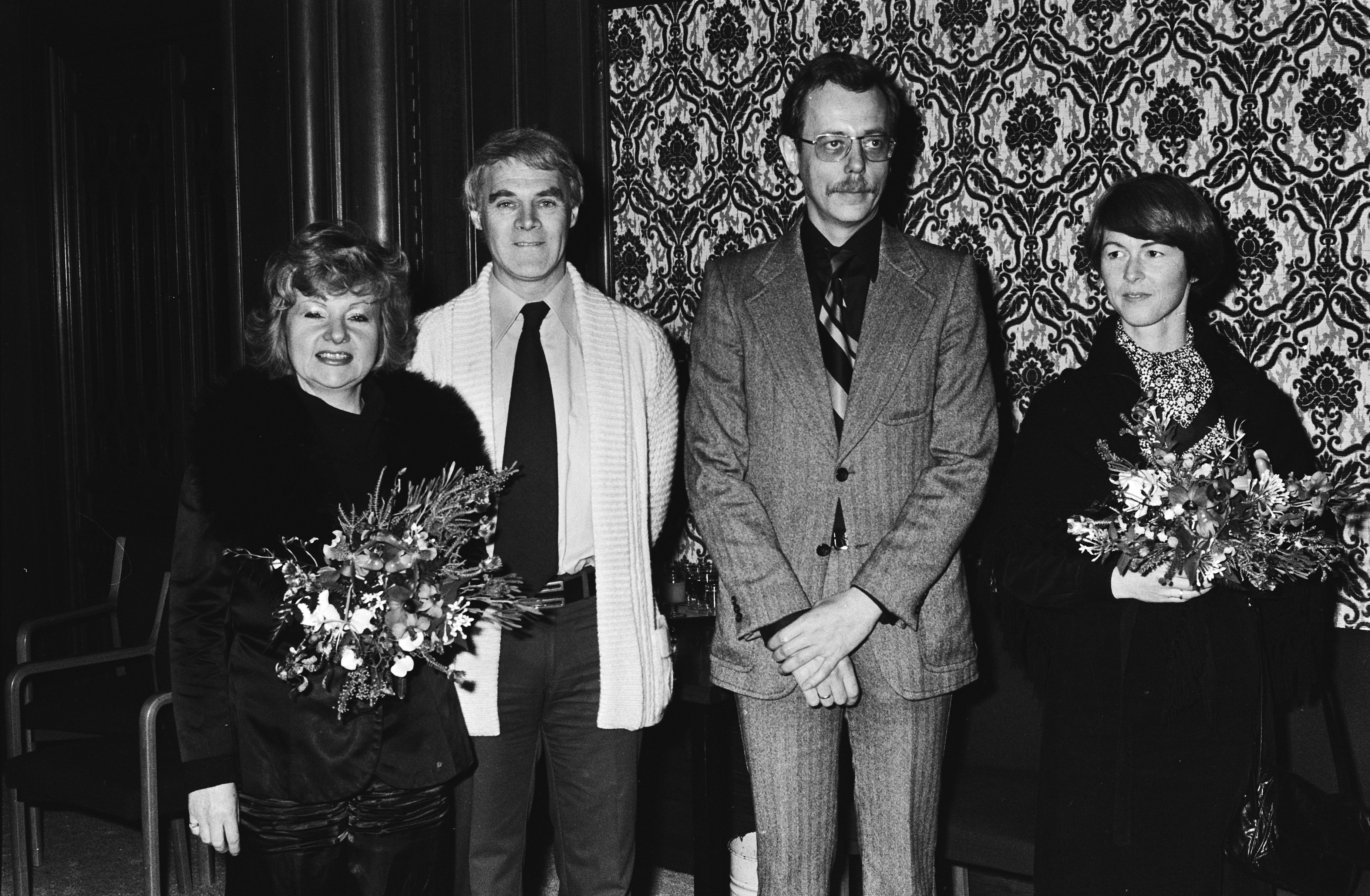 Collectie / Archief : Fotocollectie Anefo Reportage / Serie : [ onbekend ] Beschrijving : Glaxo-wetenschapsprijs uitgereikt door Prins Claus aan A. Gisolf in Tropenmuseum Amsterdam; opdracht Datum : 20 december 1977 Locatie : Amsterdam, Noord-Holland Trefwoorden : prijzen, uitreikingen Persoonsnaam : A. Gisolf, Claus, prins Instellingsnaam : Tropenmuseum Fotograaf : Suyk, Koen / Anefo Auteursrechthebbende : Nationaal Archief Materiaalsoort : Negatief (zwart/wit) Nummer archiefinventaris : bekijk toegang 2.24.01.05 Bestanddeelnummer : 929-4955 Reacties Geplaatst door Peter Kuiper op 18 januari 2017 - 14:36. links Sylvia de Leur, de echtgenote van Aart Gisolf.